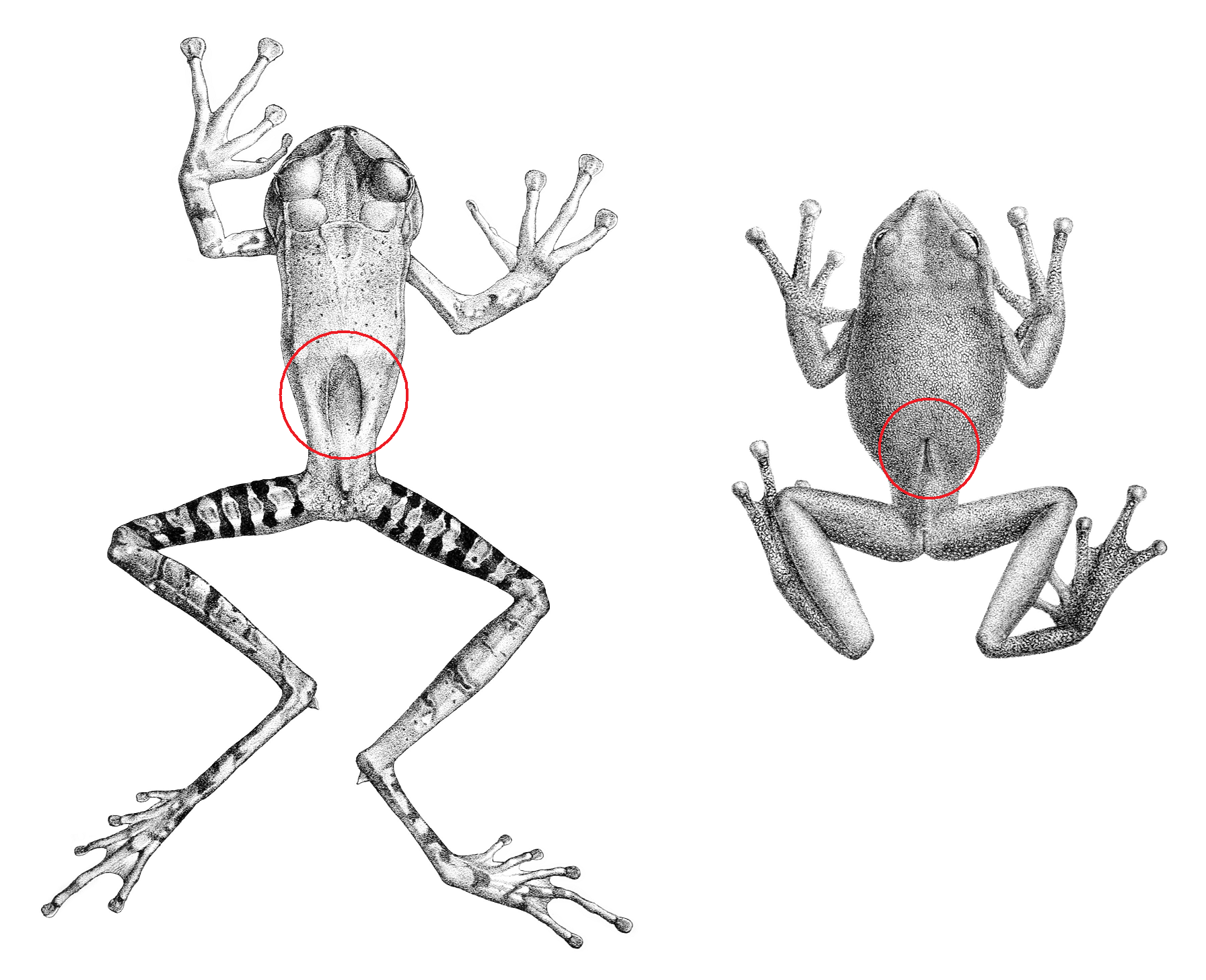 Merged [Gastrotheca guentheri (2).jpg] and [Gastrotheca plumbea.jpg].